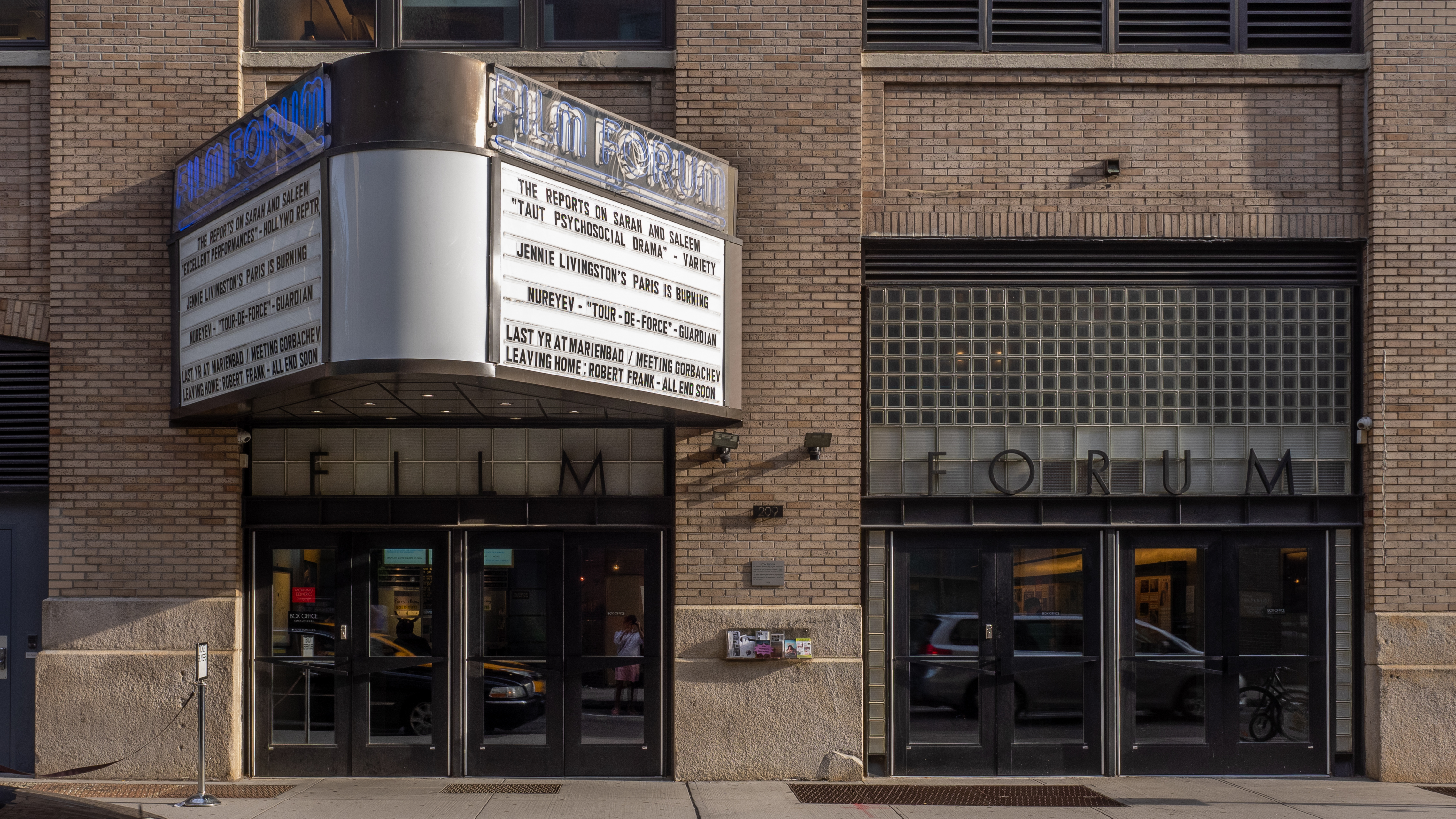 SoHo, NYC